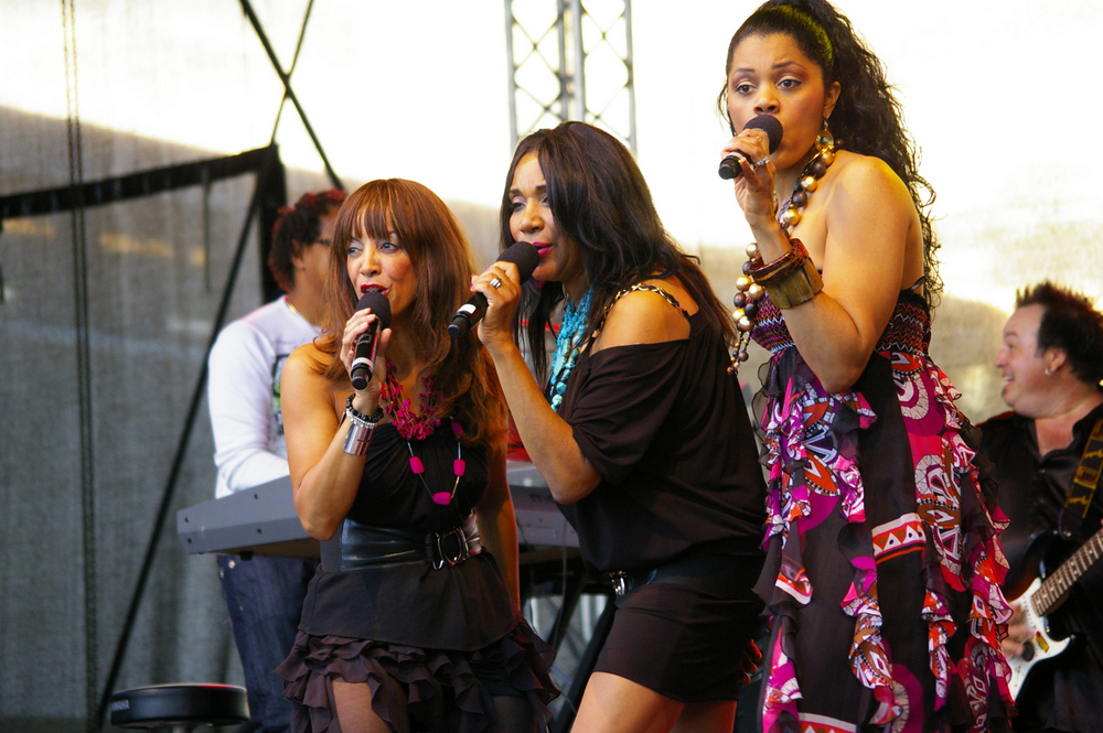 Foto der Sister Sledge anlässlich der Eröffnungsfeier der U2-Verlängerung in Wien Vienna Austria